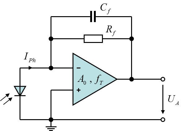 Schaltbild für Fotodiodenverstärker